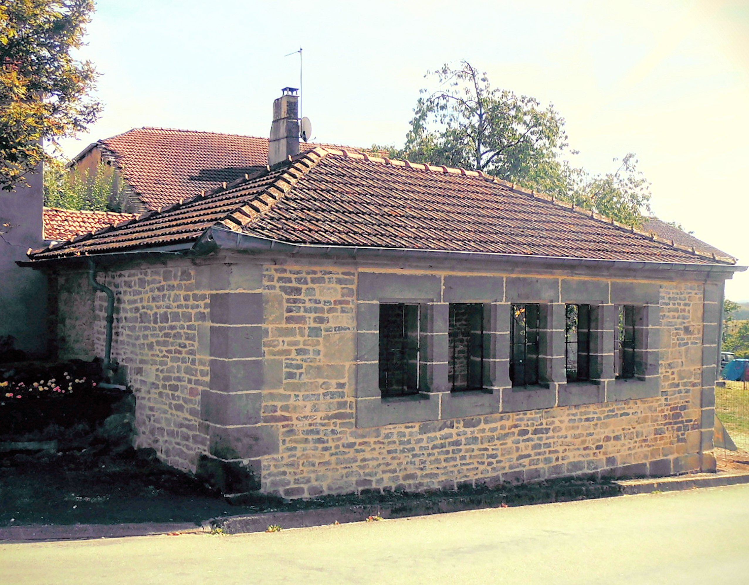 L'ancien lavoir de Chaumont-la-Ville